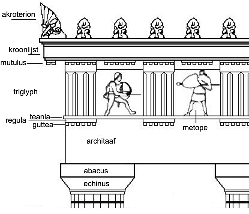 beschrijving Dorisch Orde